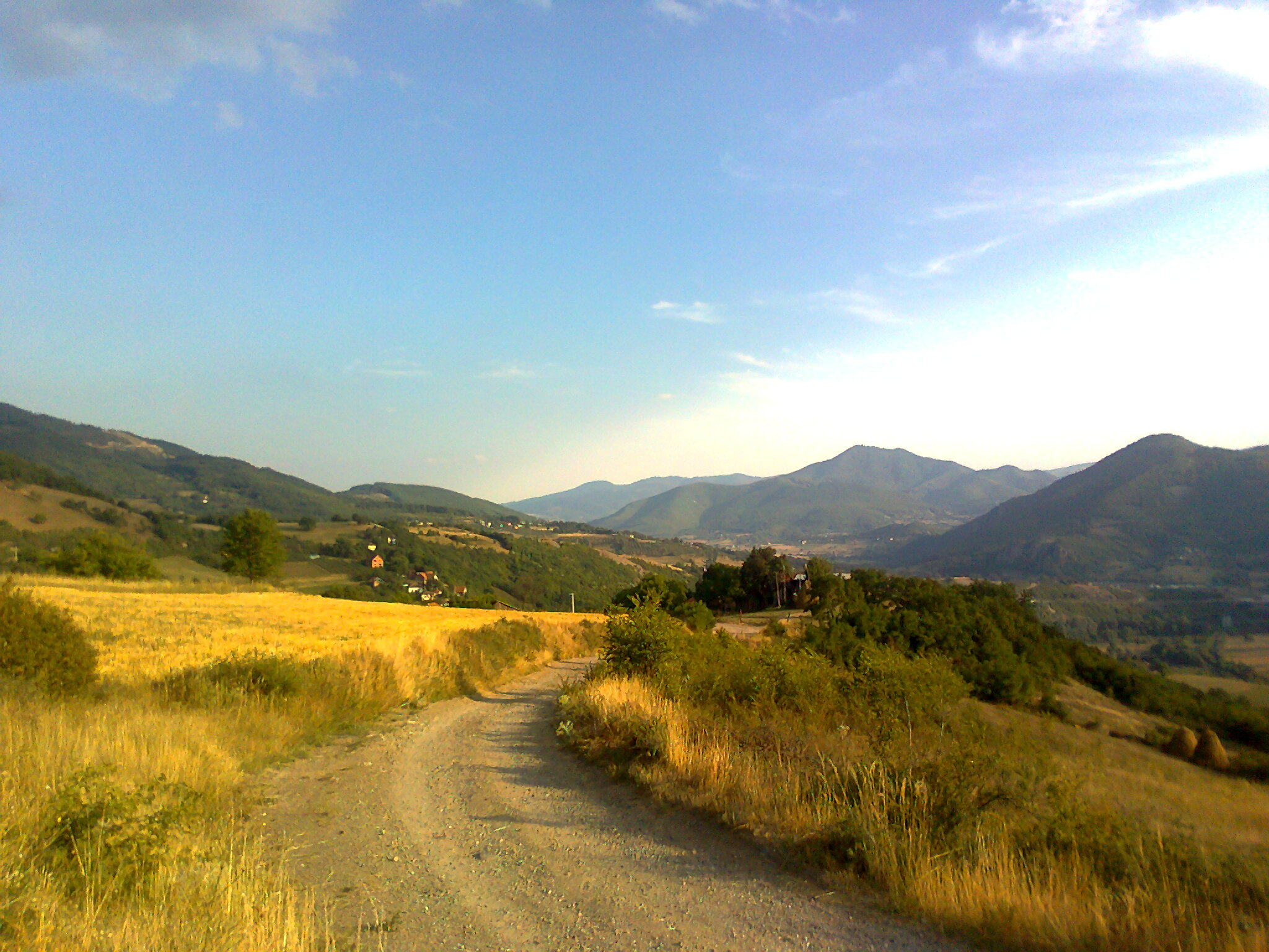 Pejzaz sela